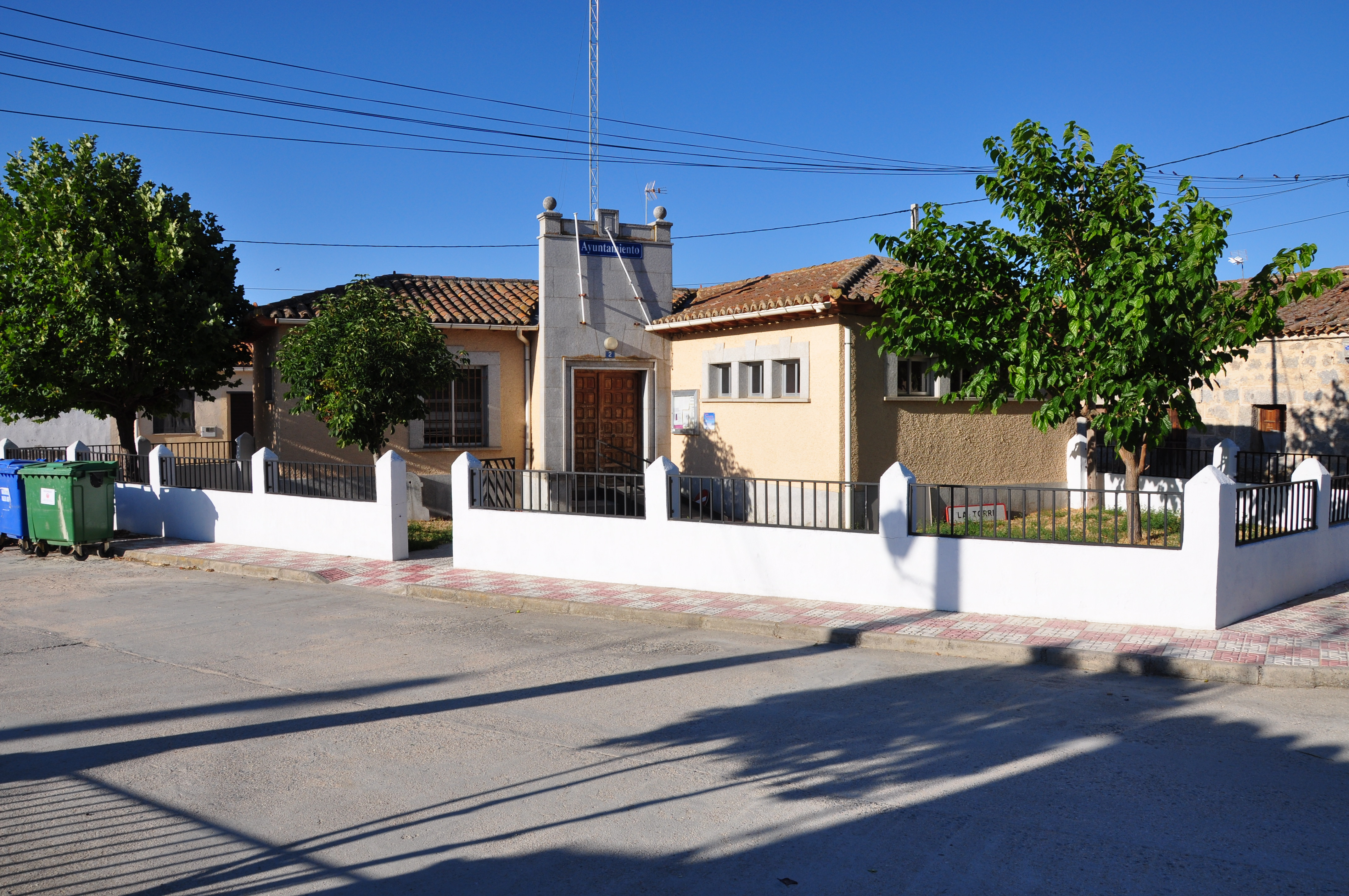 Ayuntamiento de La Torre (Ávila), España.